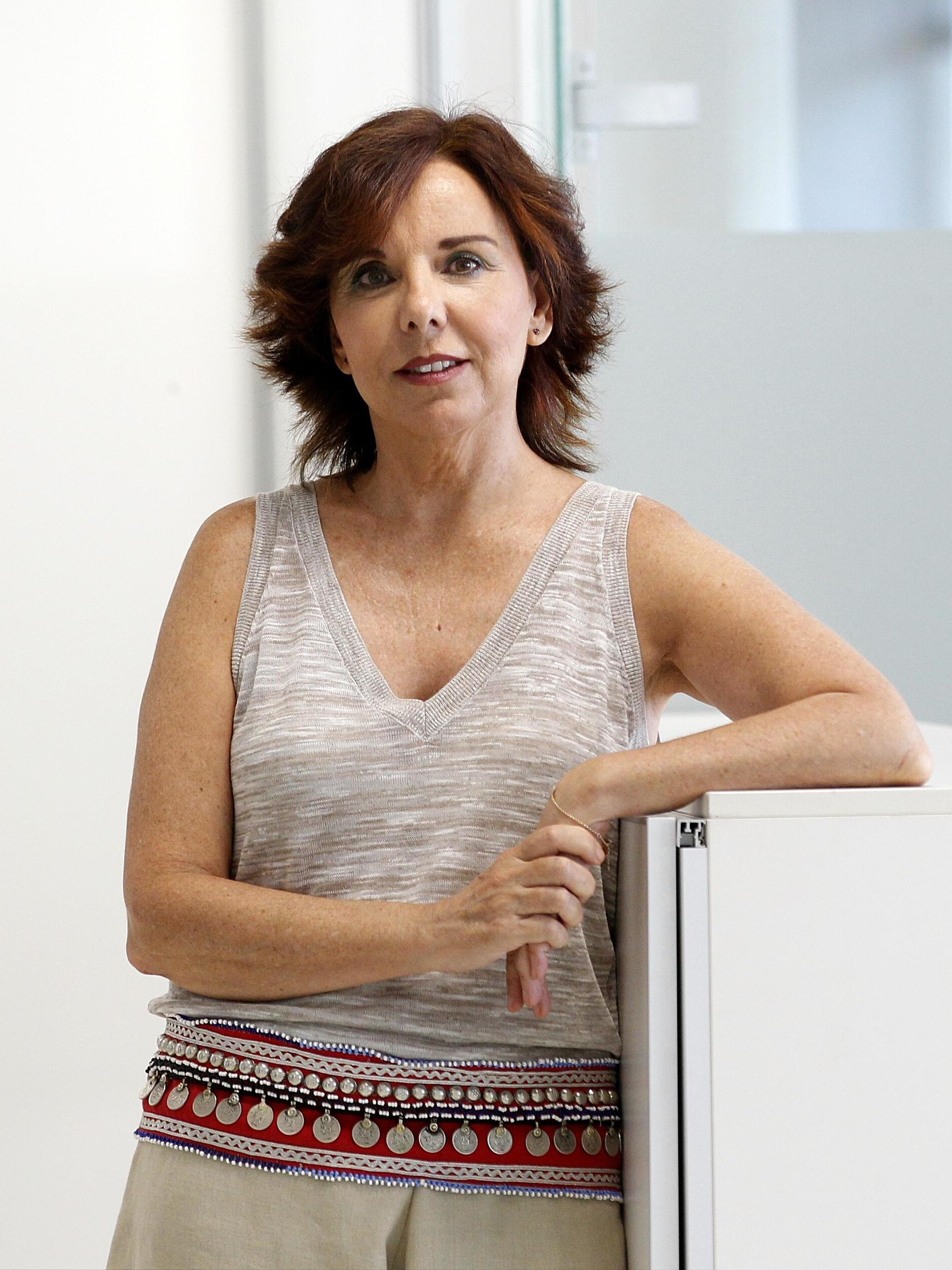 "Mi trabajo no es criticar al Gobierno", dice Esther Arizmendi, presidenta del Consejo de Transparencia. "Mi sueldo (102.000 euros) no es un sueldo caprichoso. Es un sueldo muy bueno que me obliga a trabajar por vocación y retribución de una manera muy intensa y muy responsable"